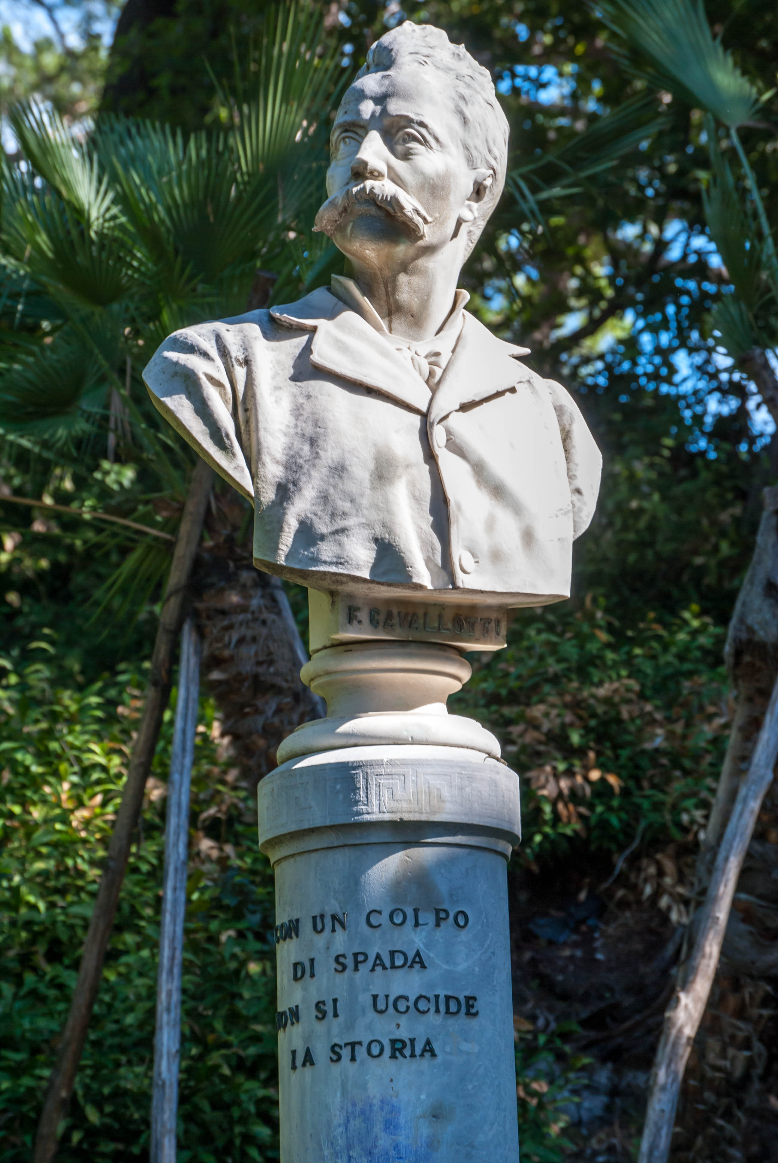 Villetta Di Negro This is a photo of a monument which is part of cultural heritage of Italy.